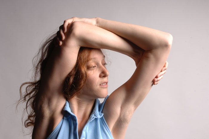 מאיה ברינר